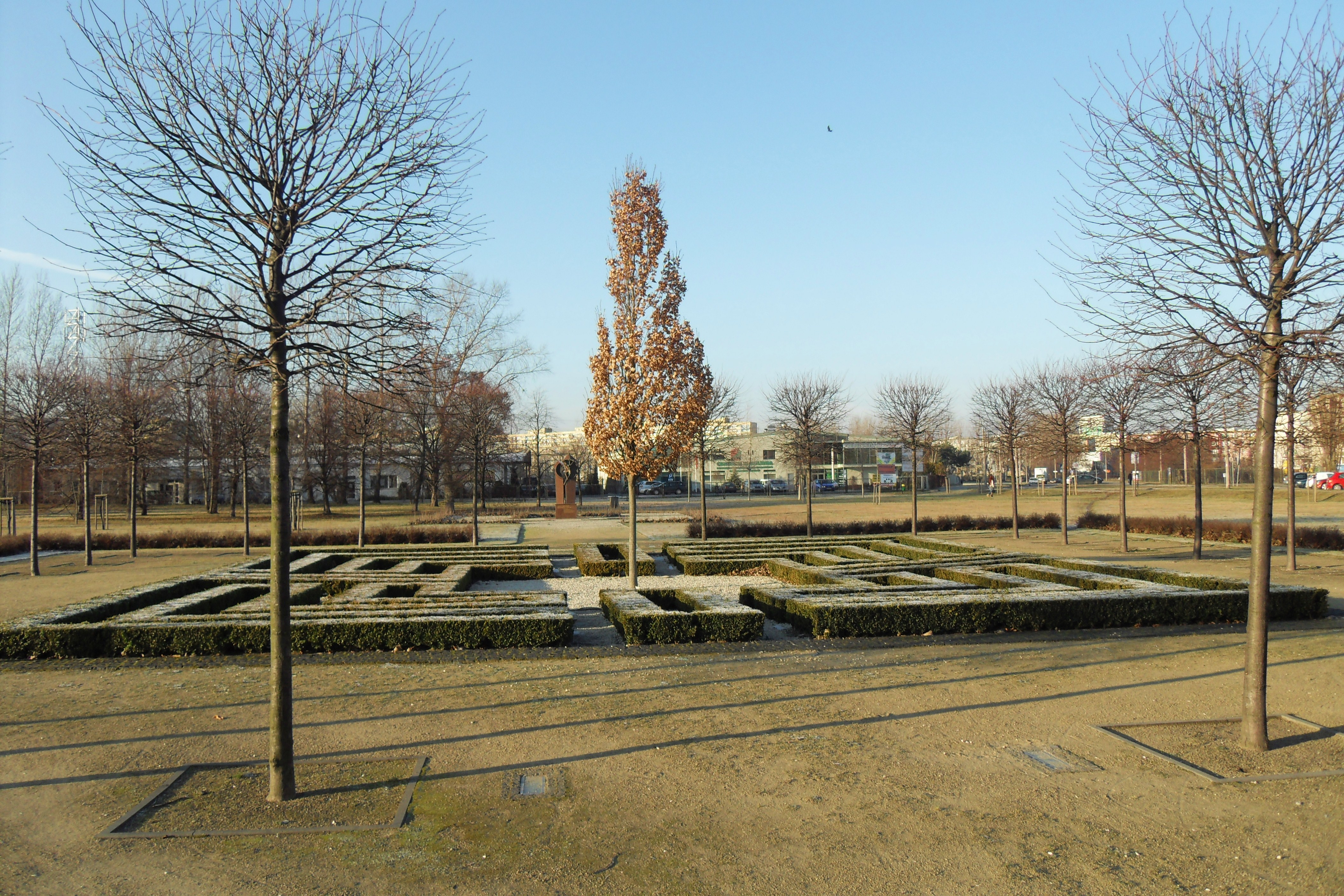 Gdańsk Zaspa, park im. Jana Pawła II. Zielony pomnik, upamiętniający pontyfikat JP II i 20-tą rocznicę mszy świętej na Zaspie.